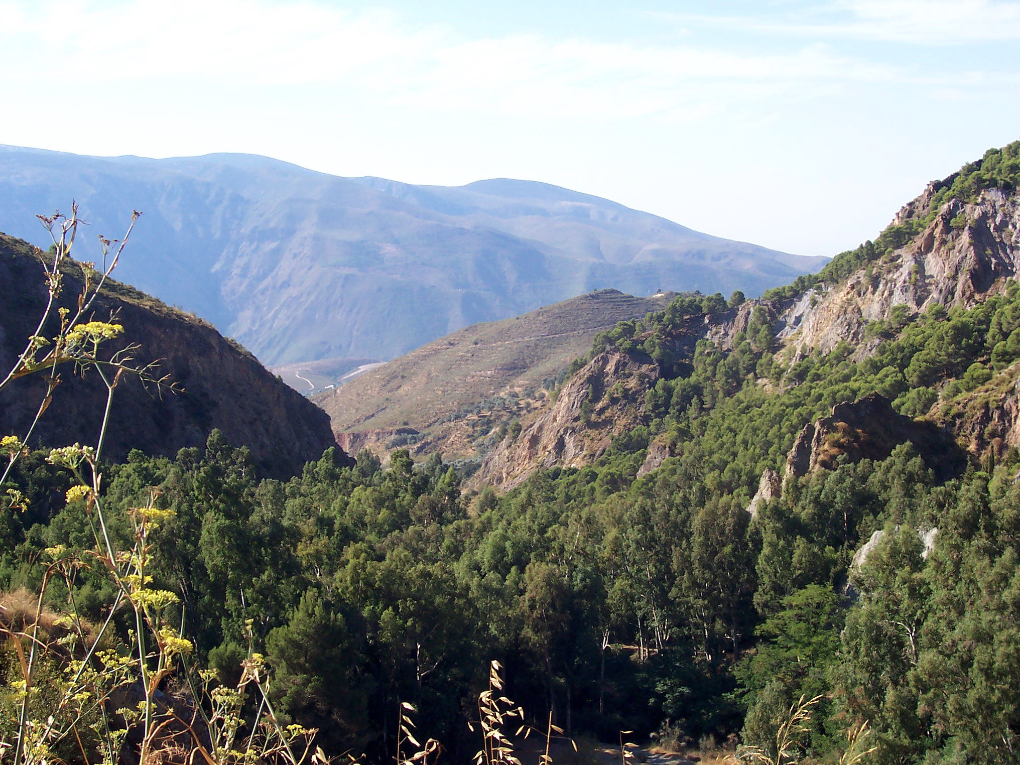 Ein typisches Tal in den Alpujarras